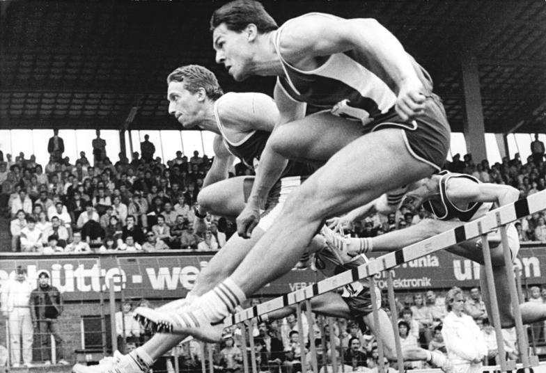 Holger Poland, Andreas Oschkenat ADN-ZB Kluge 25.6.88 Rostock: 39. DDR-Meisterschaften Leichtathletik - Neuer DDR-Meister über 110 Meter Hürden wurde am 24.6.1988 der DHfK-Athlet Holger Poland (vorn) mit 13,67 Sekunden vor Titelverteidiger Andreas Oschkenat (SC Dynamo Berlin).